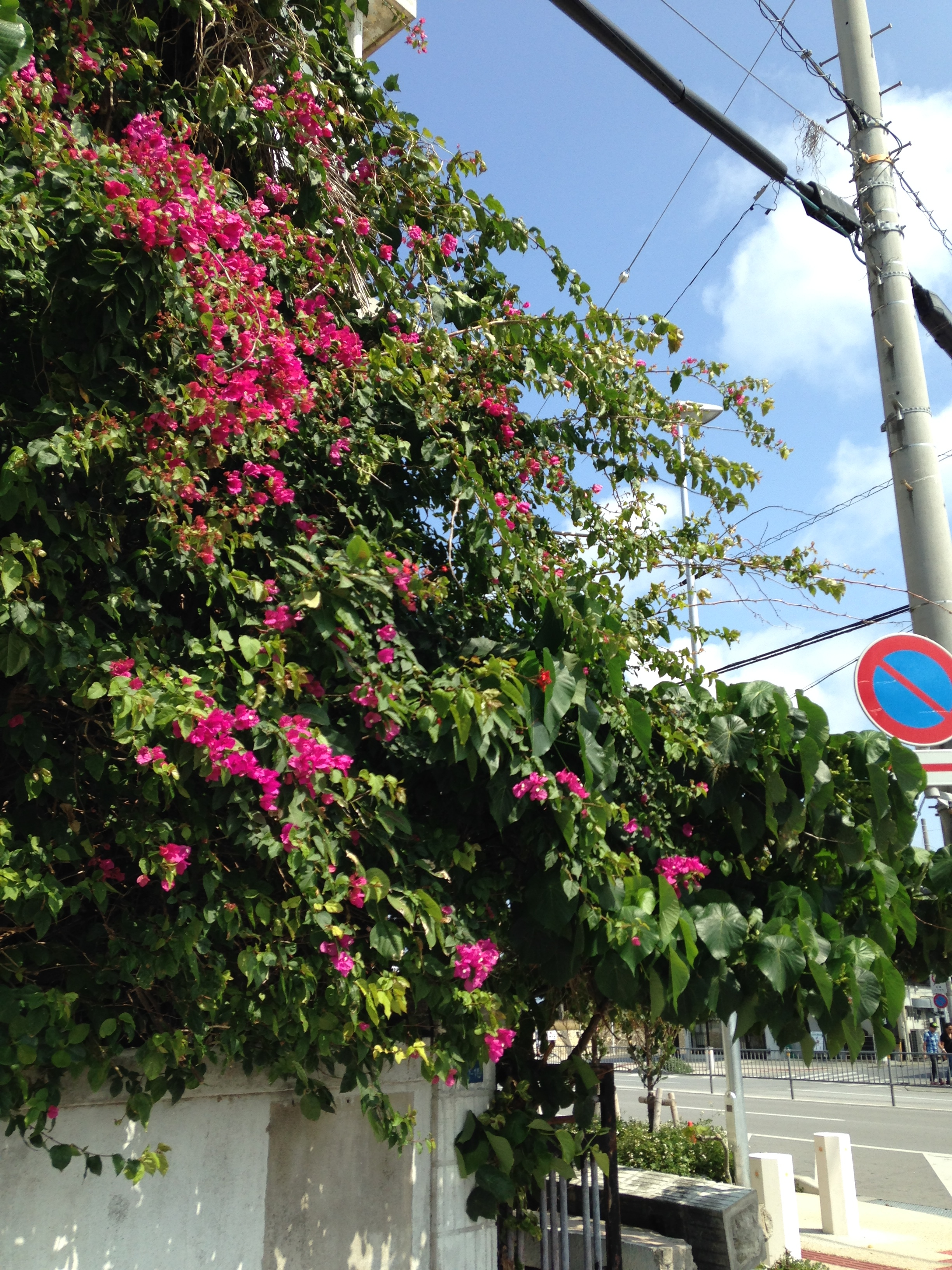 マックスバリュ若狭店付近のブーゲンビリア